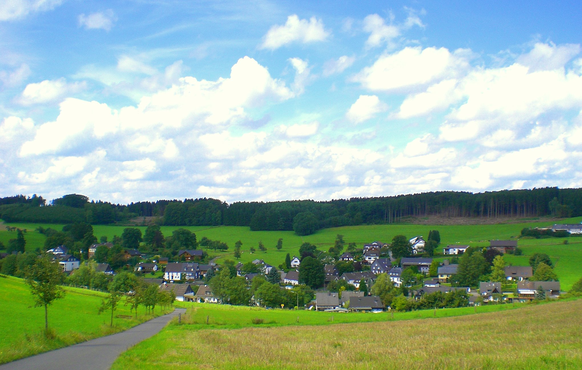 Wallefeld Oberdorf